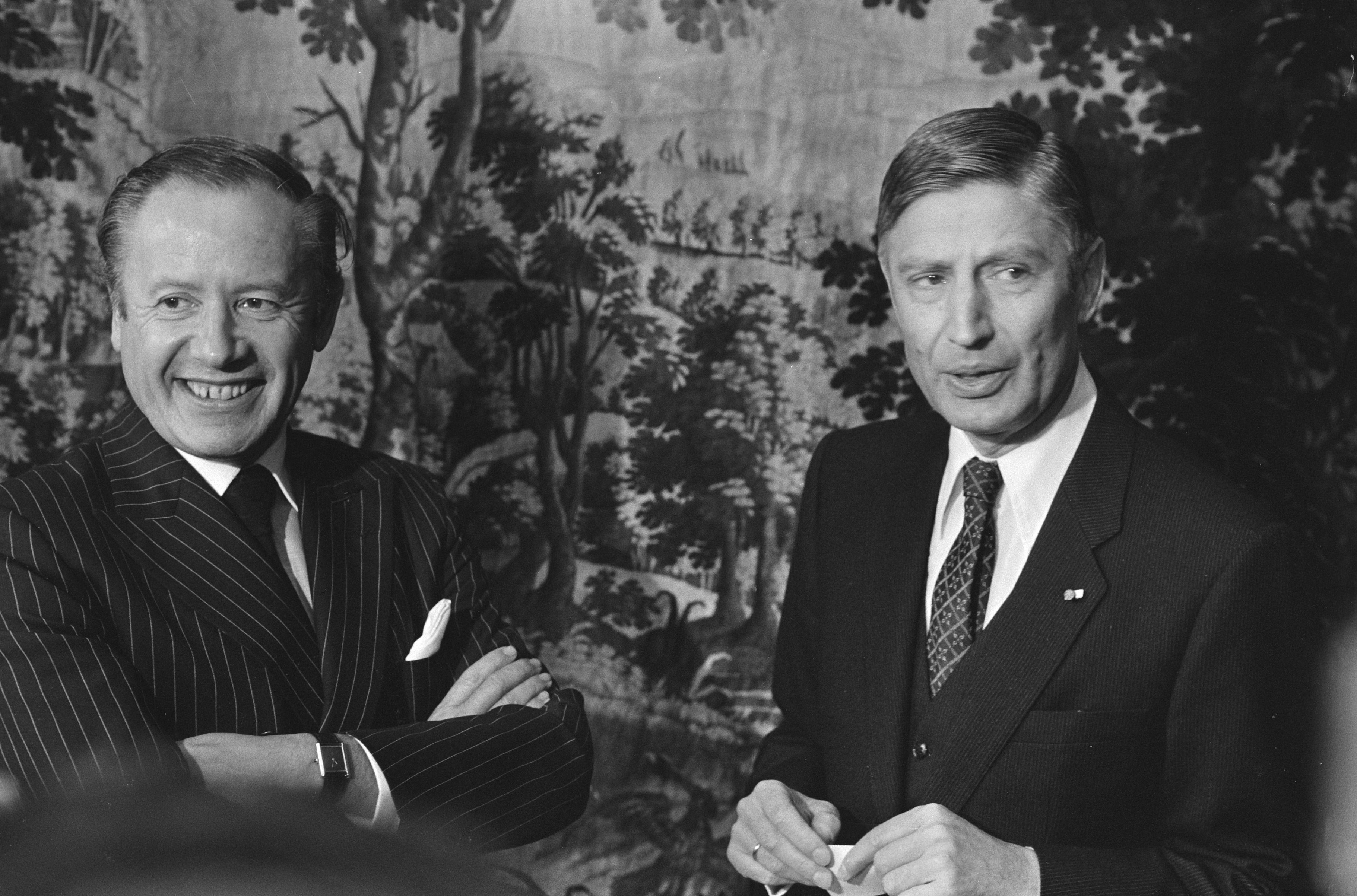 Collectie / Archief : Fotocollectie Anefo Reportage / Serie : [ onbekend ] Beschrijving : Premier Van Agt heeft op Catshuis Luxemburgse Minister BuiZa, Gaston Thorn ontvangen, Thorn wordt volgend jaar voorz. Europese Commissie Datum : 22 oktober 1980 Trefwoorden : ministers, ontvangsten, premiers Persoonsnaam : Agt, Dries van, Thorn, Gaston Fotograaf : Croes, Rob C. / Anefo Auteursrechthebbende : Nationaal Archief Materiaalsoort : Negatief (zwart/wit) Nummer archiefinventaris : bekijk toegang 2.24.01.05 Bestanddeelnummer : 931-1005